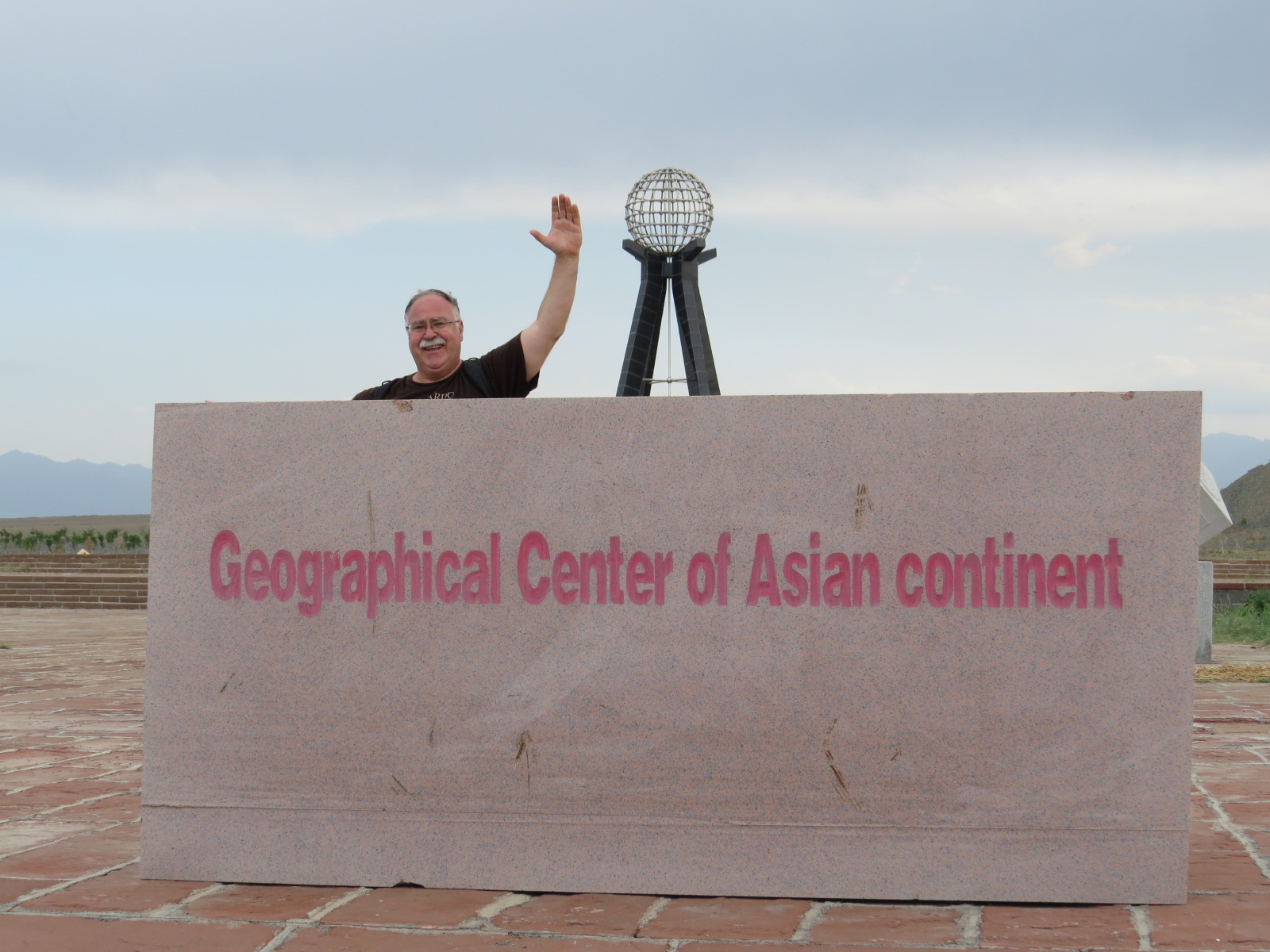 До Географският център на Азия.